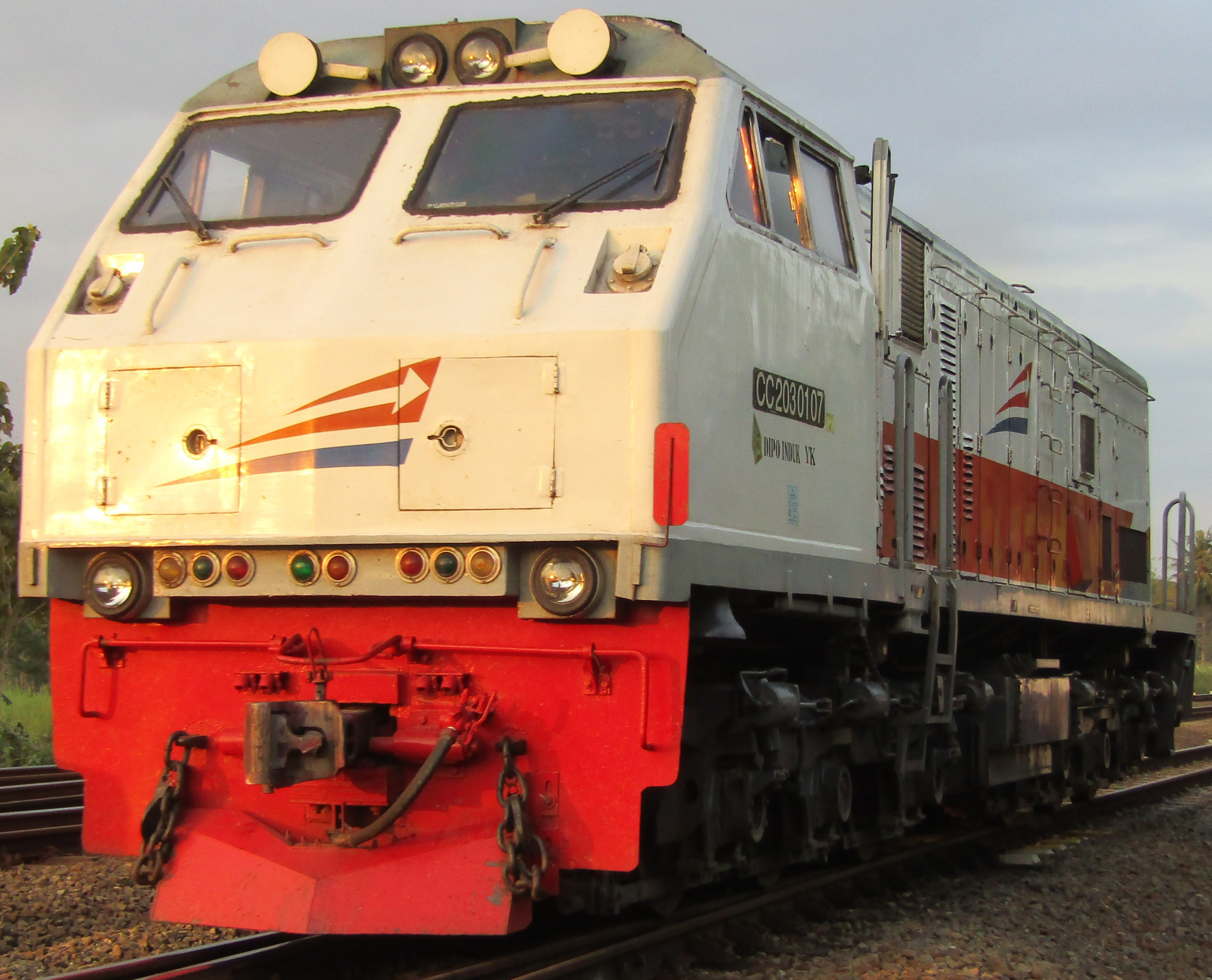 Lokomotif CC 203 01 07 di Stasiun Rewulu, 2018